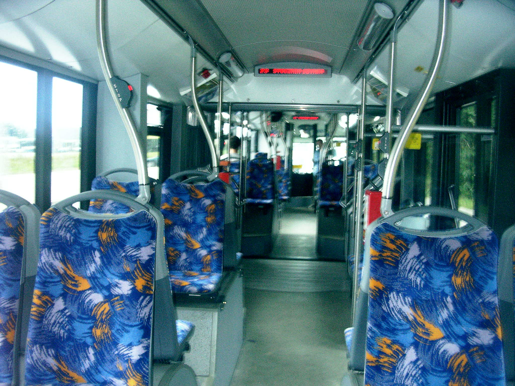 Solaris Trollino 18AC z czeskiej Ostrawy podczas jazdy testowej w Gdyni. Linia 23, pętla autobusowo-trolejbusowa Kacze Buki.